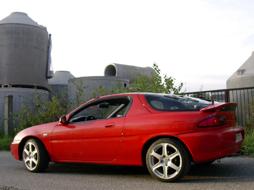 1995 Mazda MX-3 16V DOHC - Heck mit V6 Spoiler - cLuKe - 10.2005